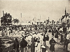 中文（中国大陆）: 南洋劝业会盛景（摄于1910年）